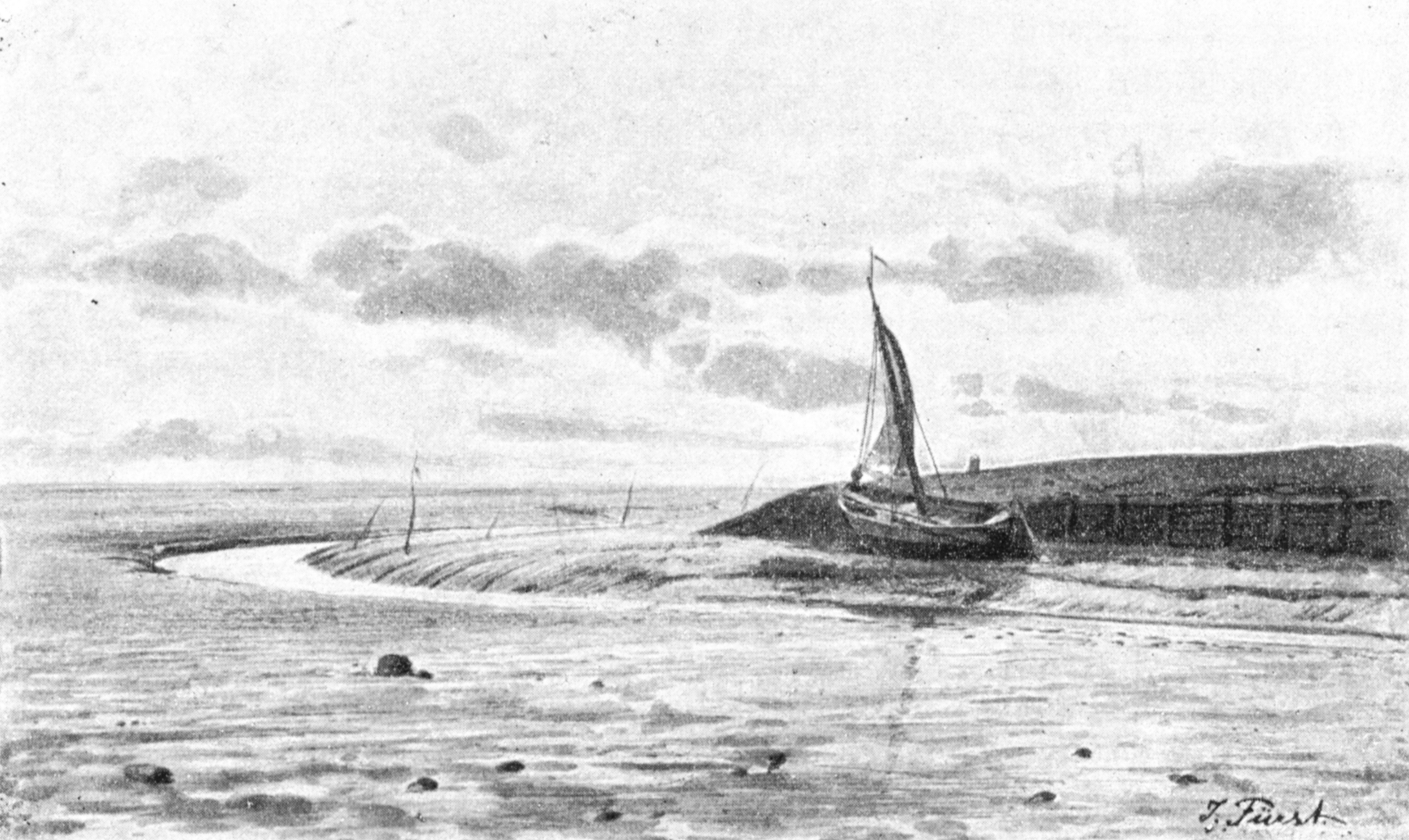 Das Wattenmeer vor Büsum bei Ebbe, Zeichnung von Julius Fürst um 1895